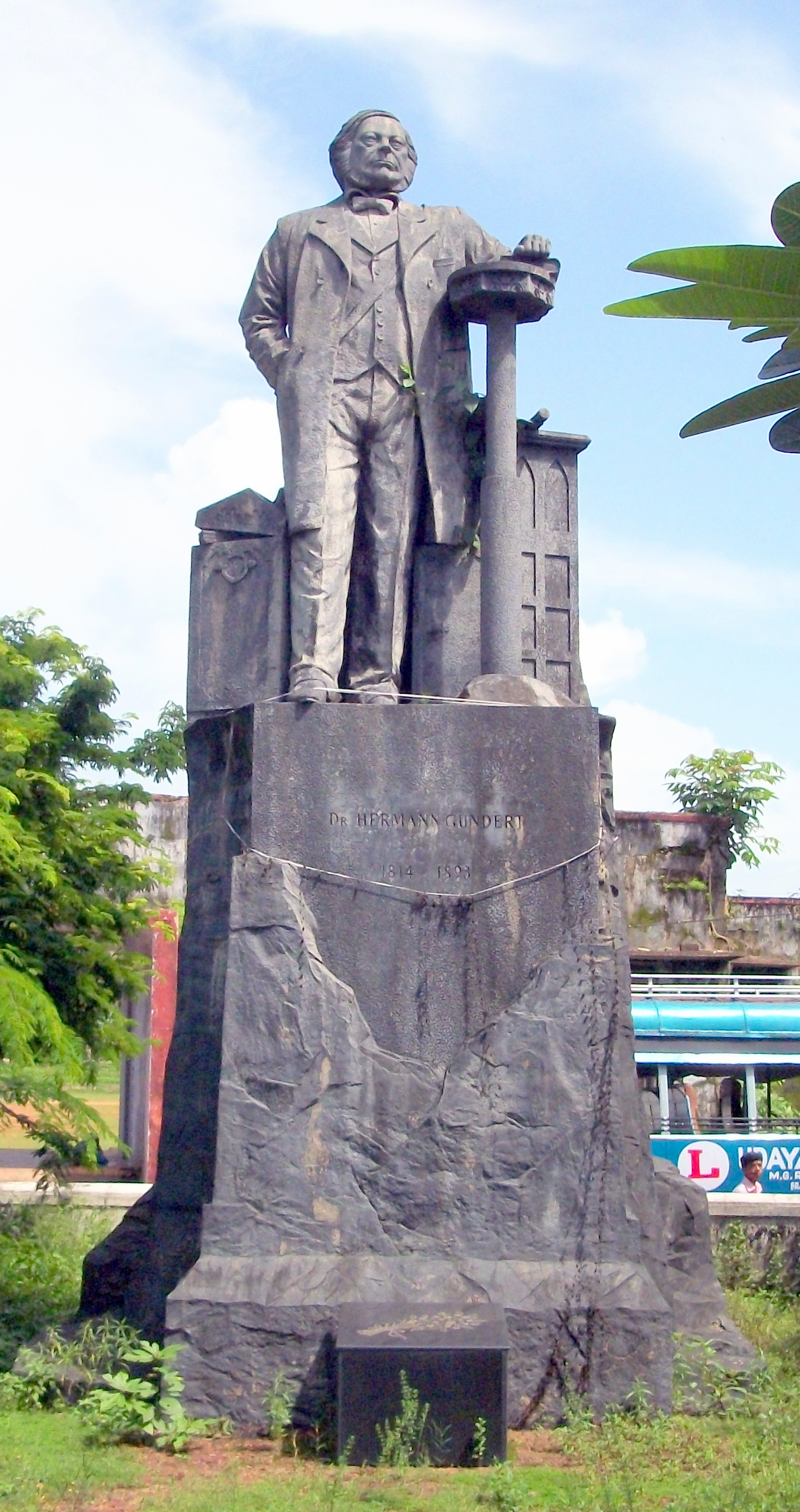 തലശ്ശേരി സ്റ്റേഡിയത്തിനു സമീപമുള്ള ഗുണ്ടർട്ട് സ്മാരക പ്രതിമ